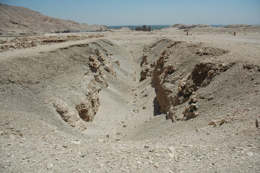 Foto des Bab el-Hosans im Areal des Totentempels des Mentuhotep II. in seinem heutigen Zustand